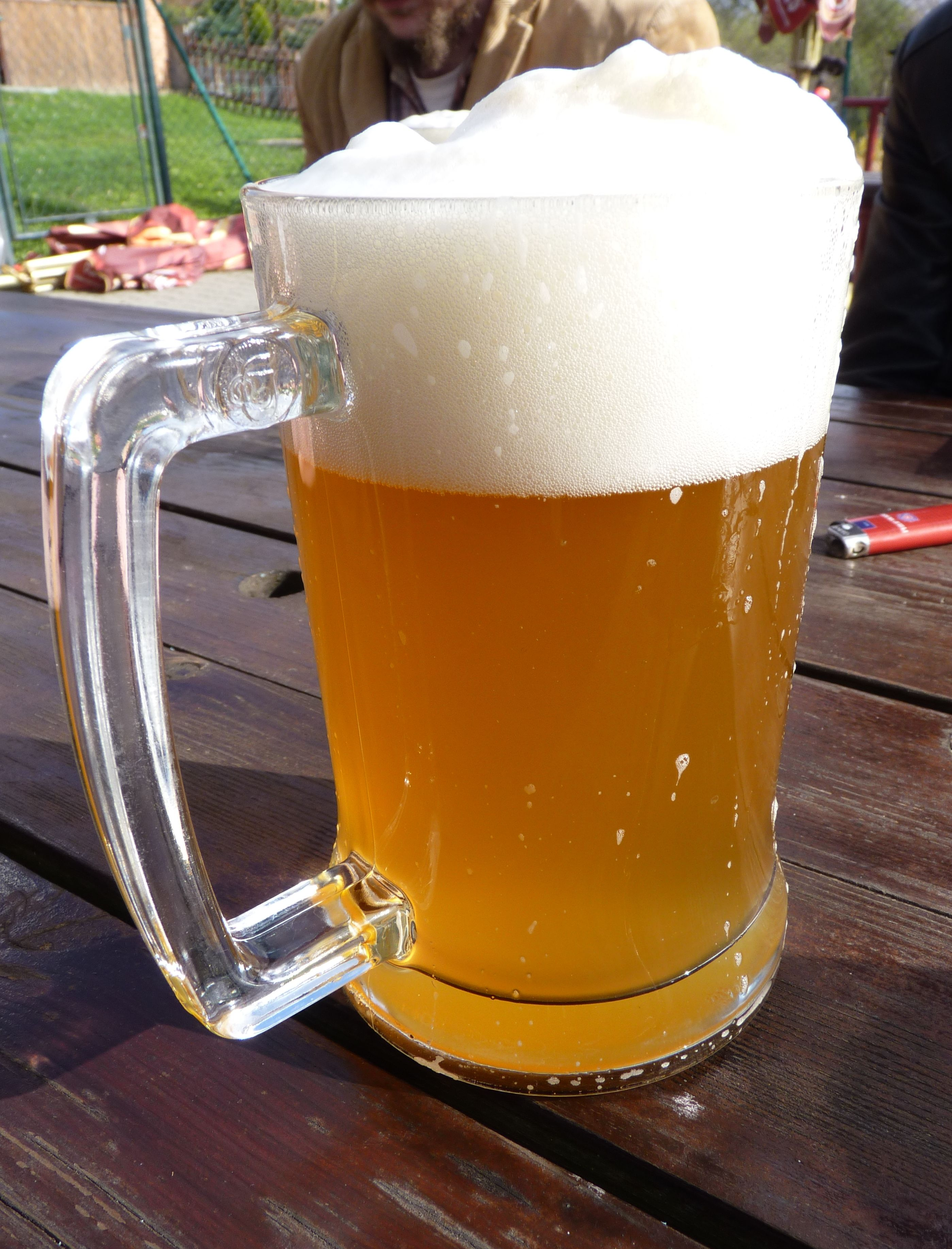 Šumavský kout, nefiltrovaný